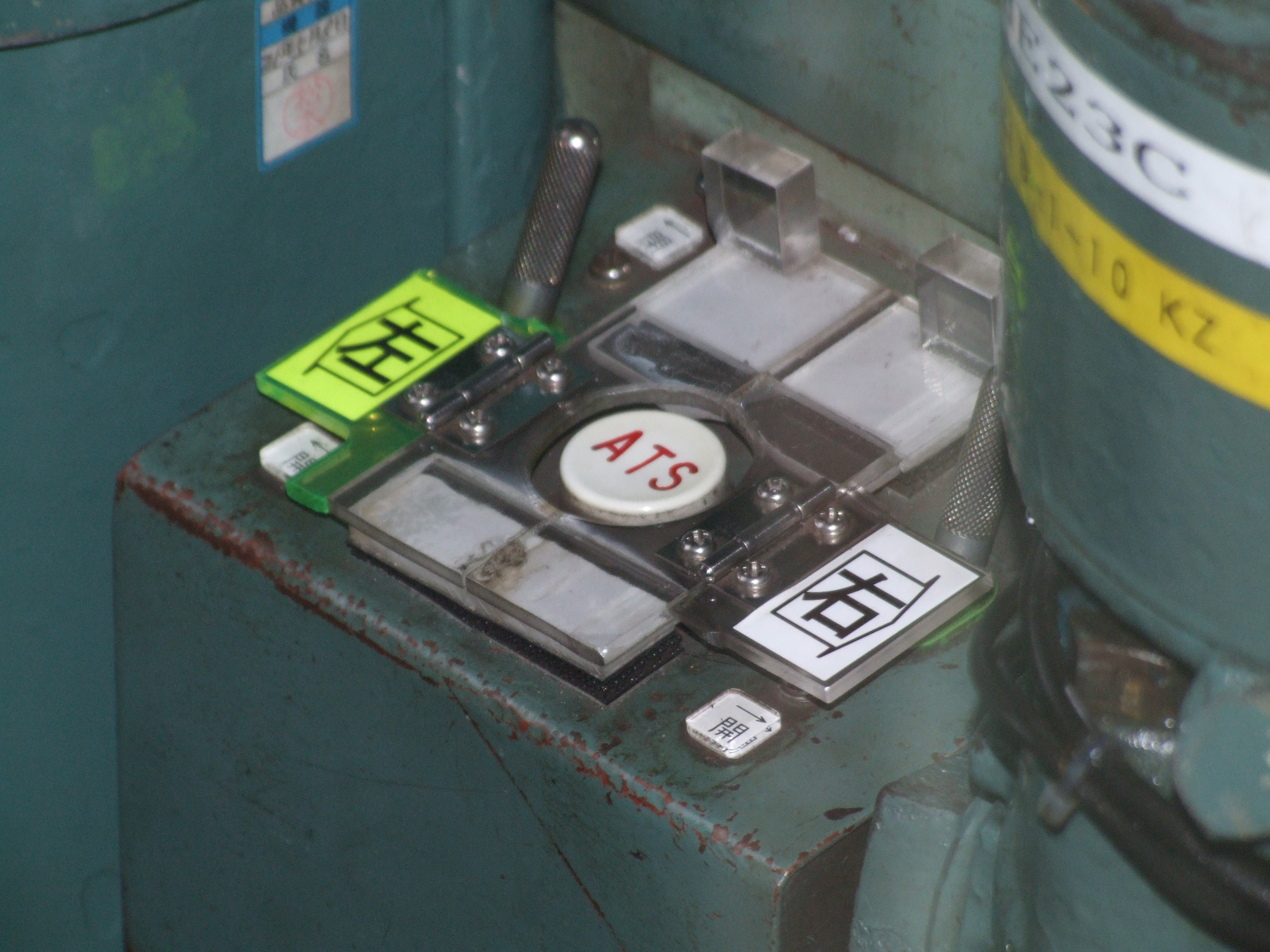 JR西日本大糸線でキハ52形で使われていた運転席にあるワンマン運転用の扉の開閉スイッチ、中央にあるのはATS-S型の警報確認ボタン（乗務員室の仕切り扉の窓越しから撮影）